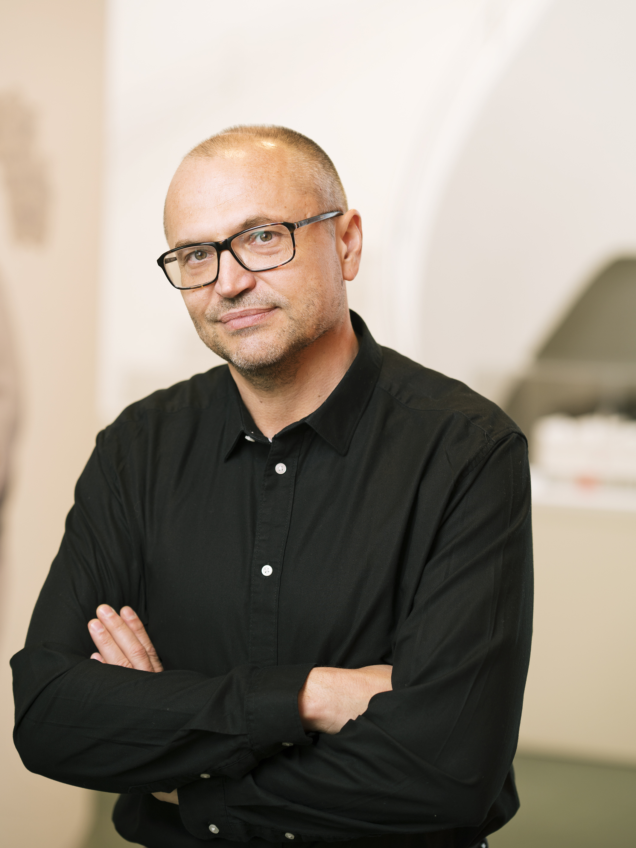 Foto: Lukas Beck